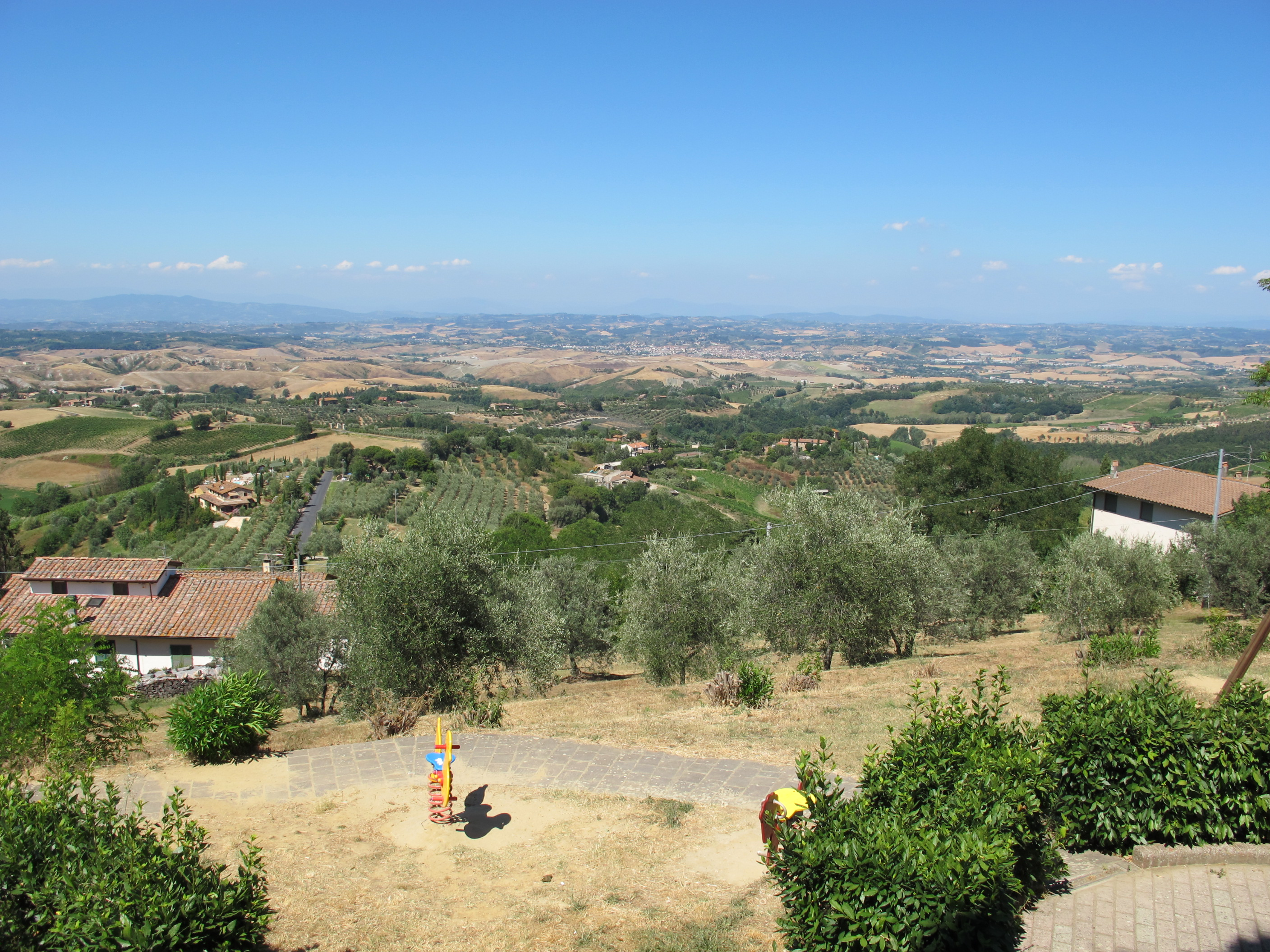 Montaione, veduta paesaggio valdarno inferiore